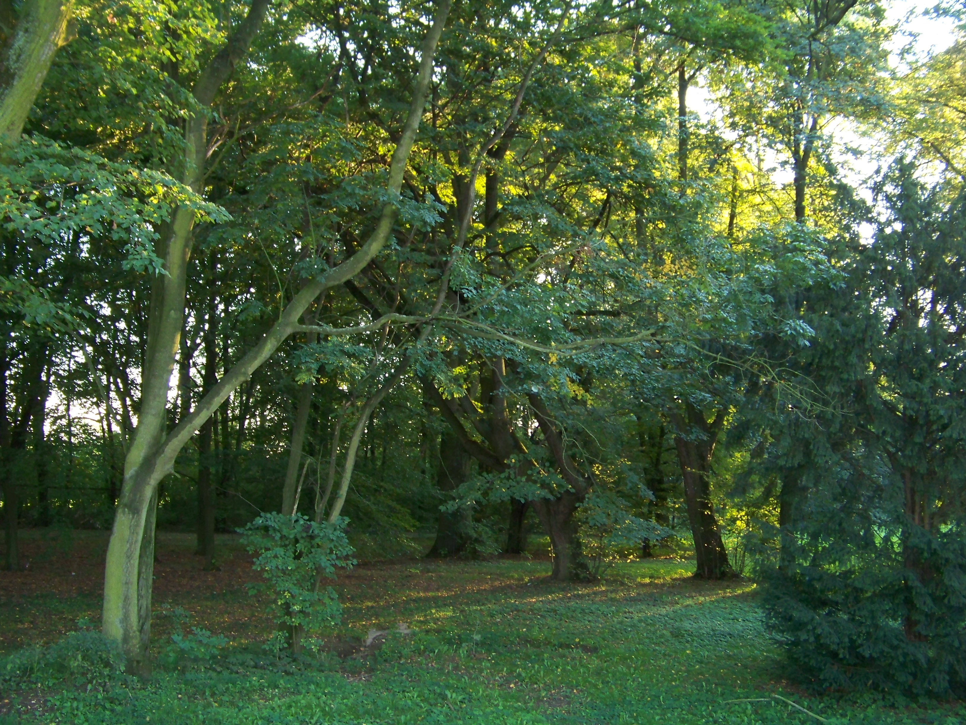 park dworski - widok na alejkę Ptakowice, Lewin Brzeski 03.1984.